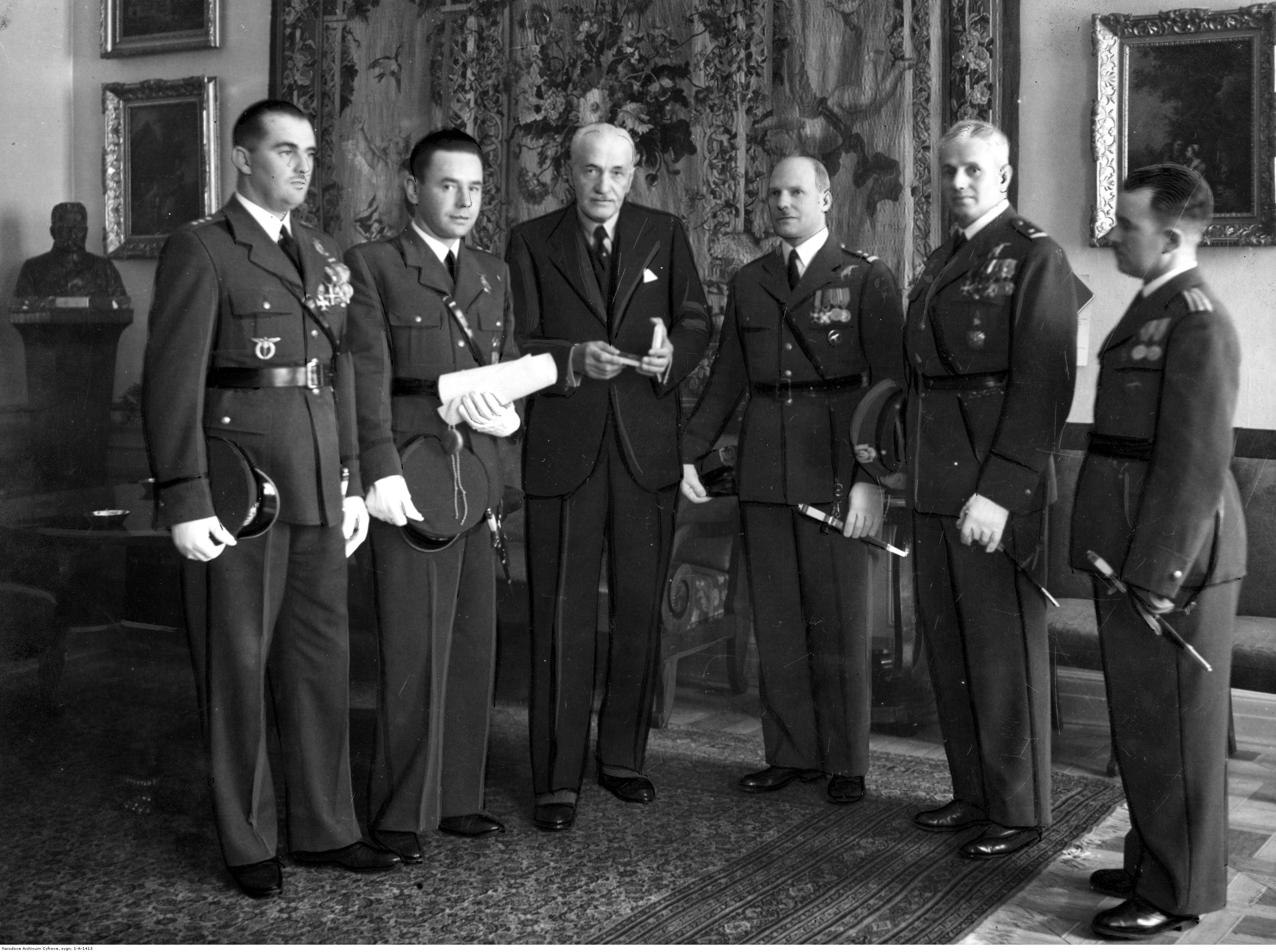 Delegacja 6 Pułku Lotniczego na audiencji u prezydenta RP Ignacego Mościckiego - wręczenie odznaki pułkowej Prezydentowi. Koncern Ilustrowany Kurier Codzienny - Archiwum Ilustracji Sygnatura: 1-A-1413